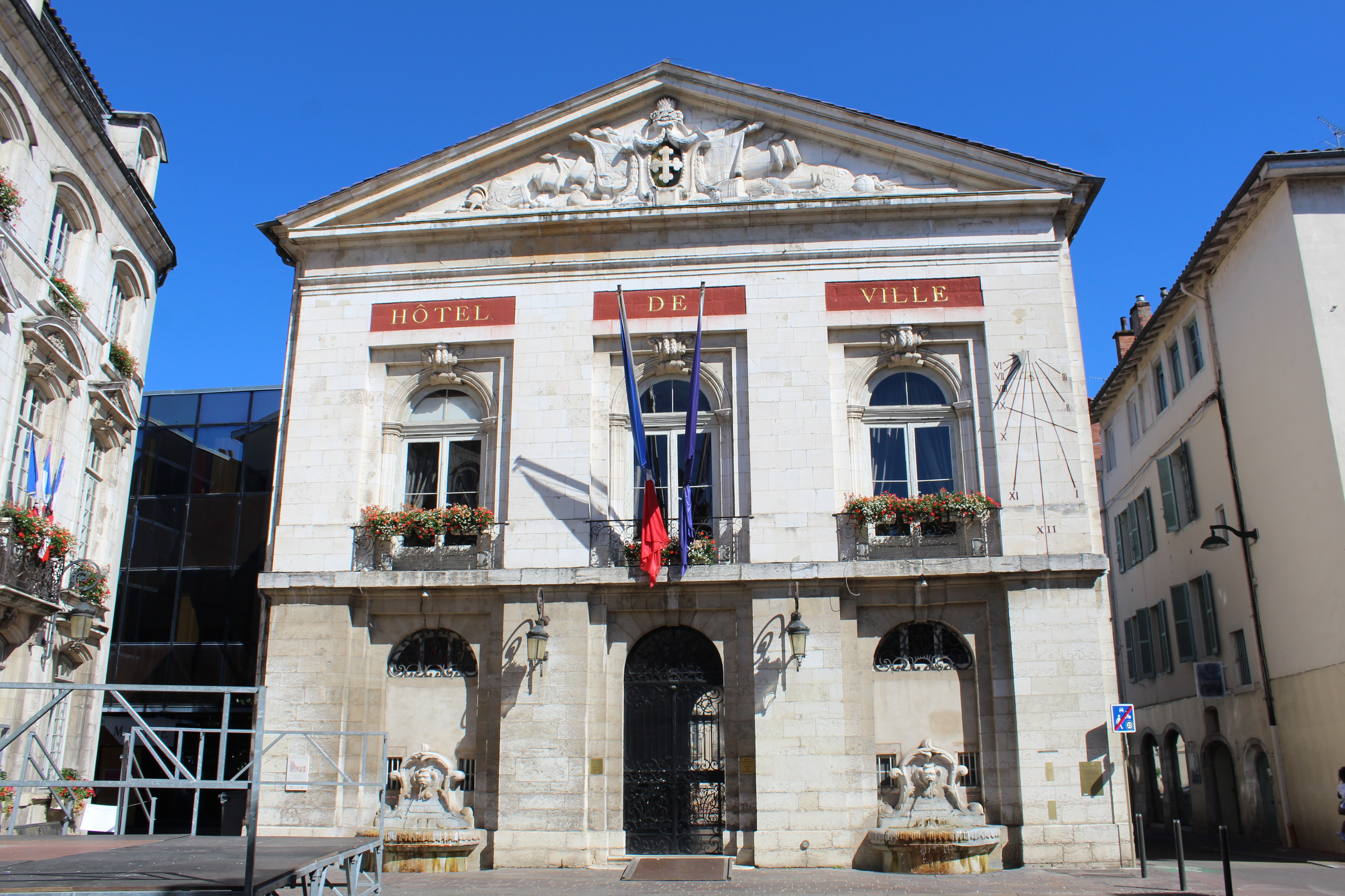 Hôtel de ville de Bourg-en-Bresse. .